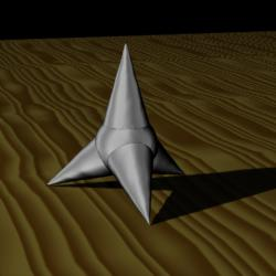 Imagen de tetsubishi. Creación propia.